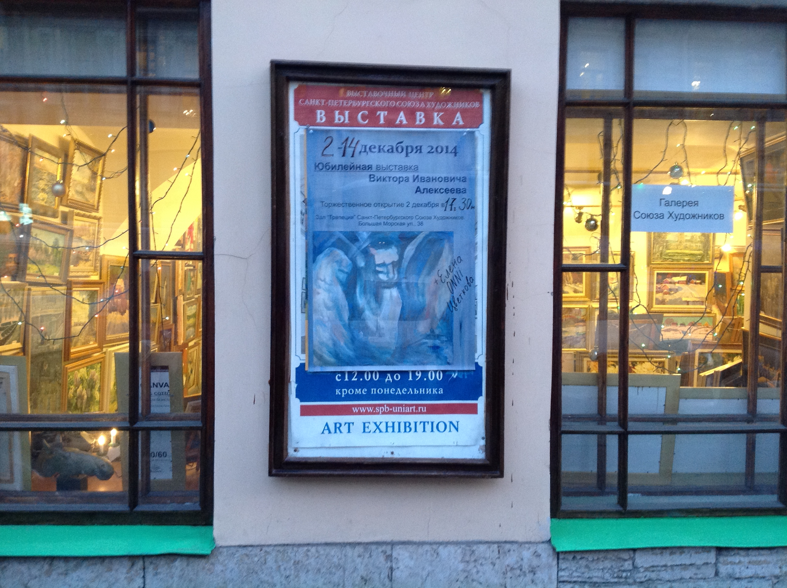 Выставка АВИ афиша 2014